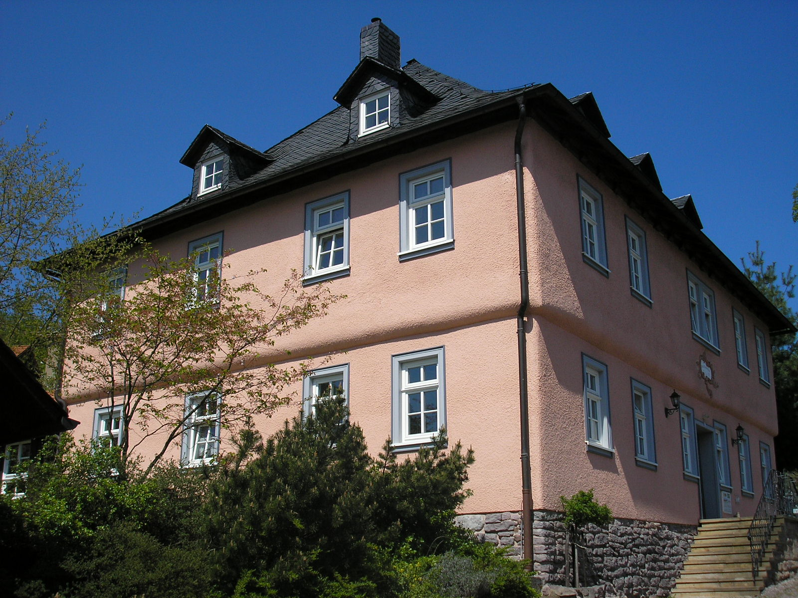 Das Zechenhaus (ältestes Gebäude Ilmenaus), früher Sitz des Ilmenauer Bergamtes.